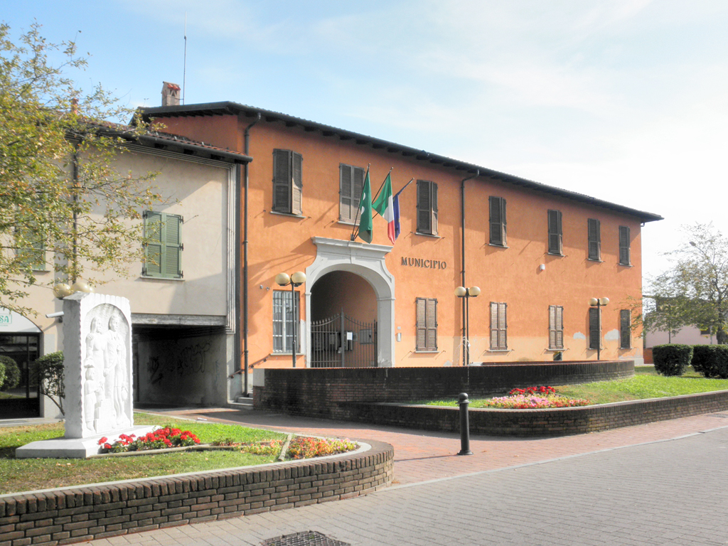 Municipio di Cerro al Lambro.